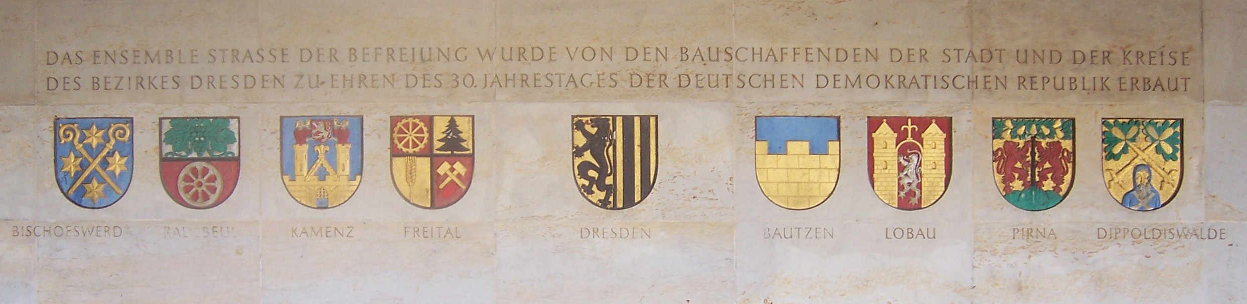 Denkmal „Straße der Befreiung“ an der Dresdner Hauptstraße. Die Inschrift lautet: Das Ensemble Straße der Befreiung wurde von den Bauschaffenden der Stadt und der Kreise des Bezirkes Dresden zu Ehren des 30. Jahrestages der Deutschen Demokratischen Republik erbaut Bischofswerda Radebeul Kamenz Freital Dresden Bautzen Löbau Pirna Dippoldiswalde Map: 51° 3′ 32″ N, 13° 44′ 33″ E